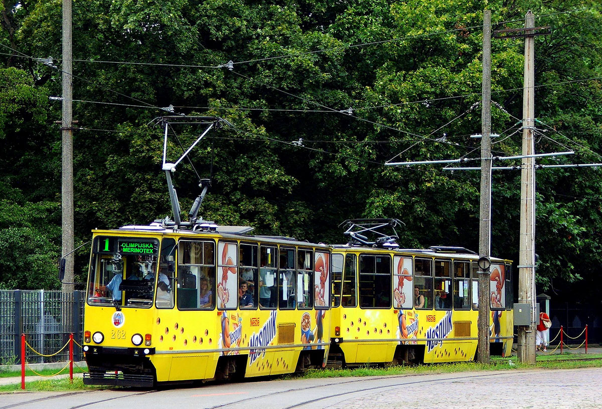 Konstal 805Na #262 + 805NaD #263 z MZK Toruń. Toruń, ul. Bydgoska.